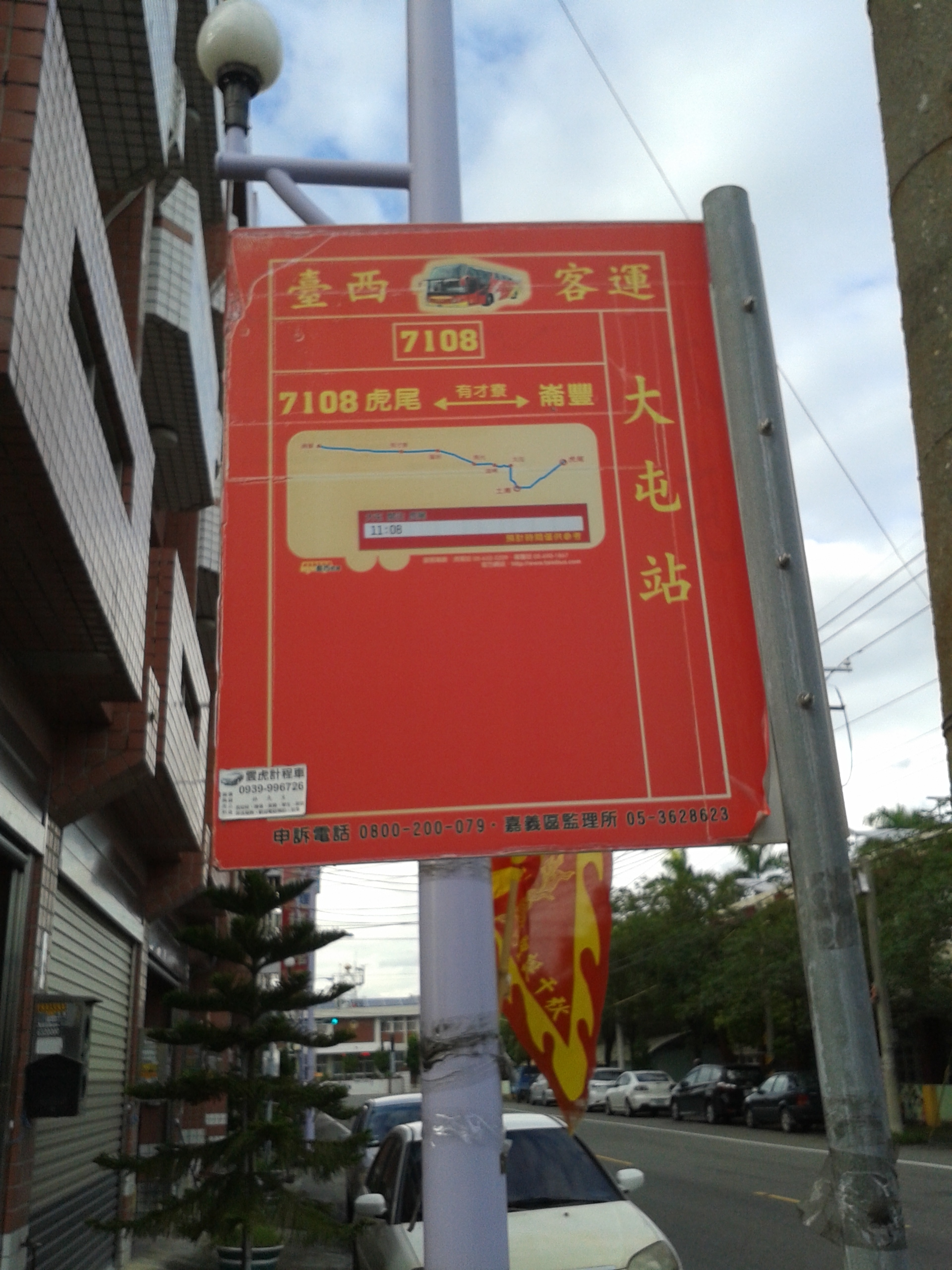 中文（台灣）: 臺西客運大屯站站牌，位在雲97線旁。